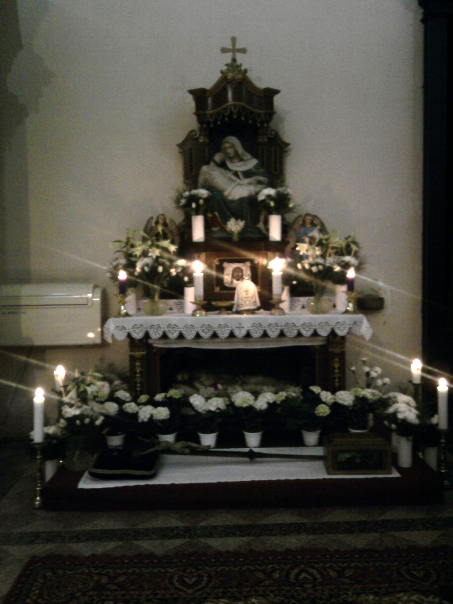 Palásti templom Nagypénteken